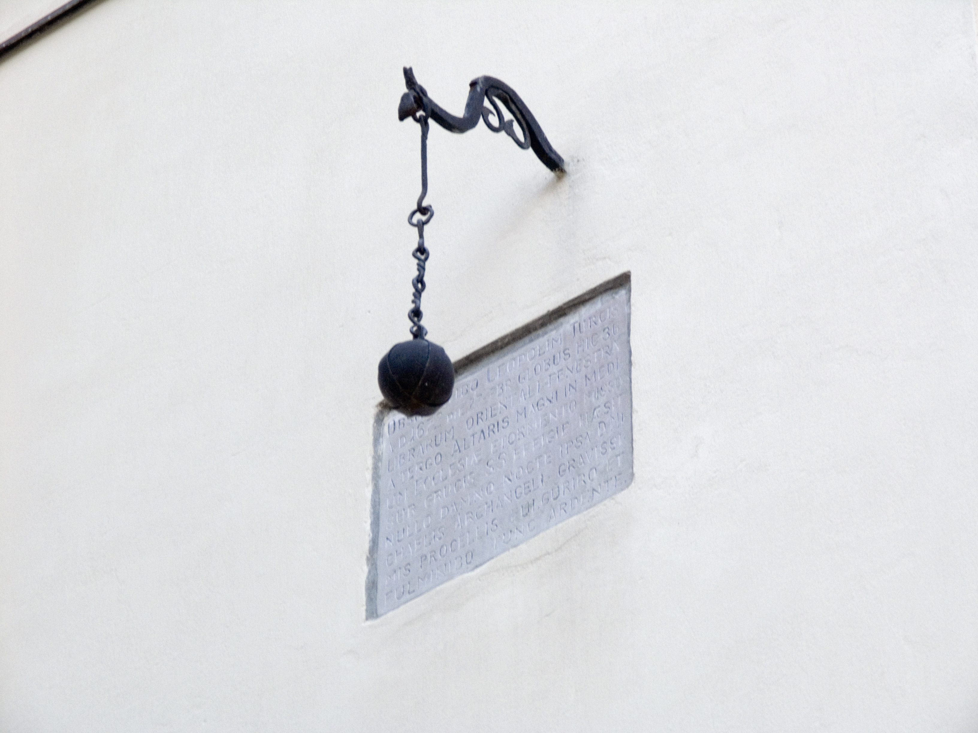 Україна, Львів - Кафедральный костел Успіння Пресвятої Діви Марии